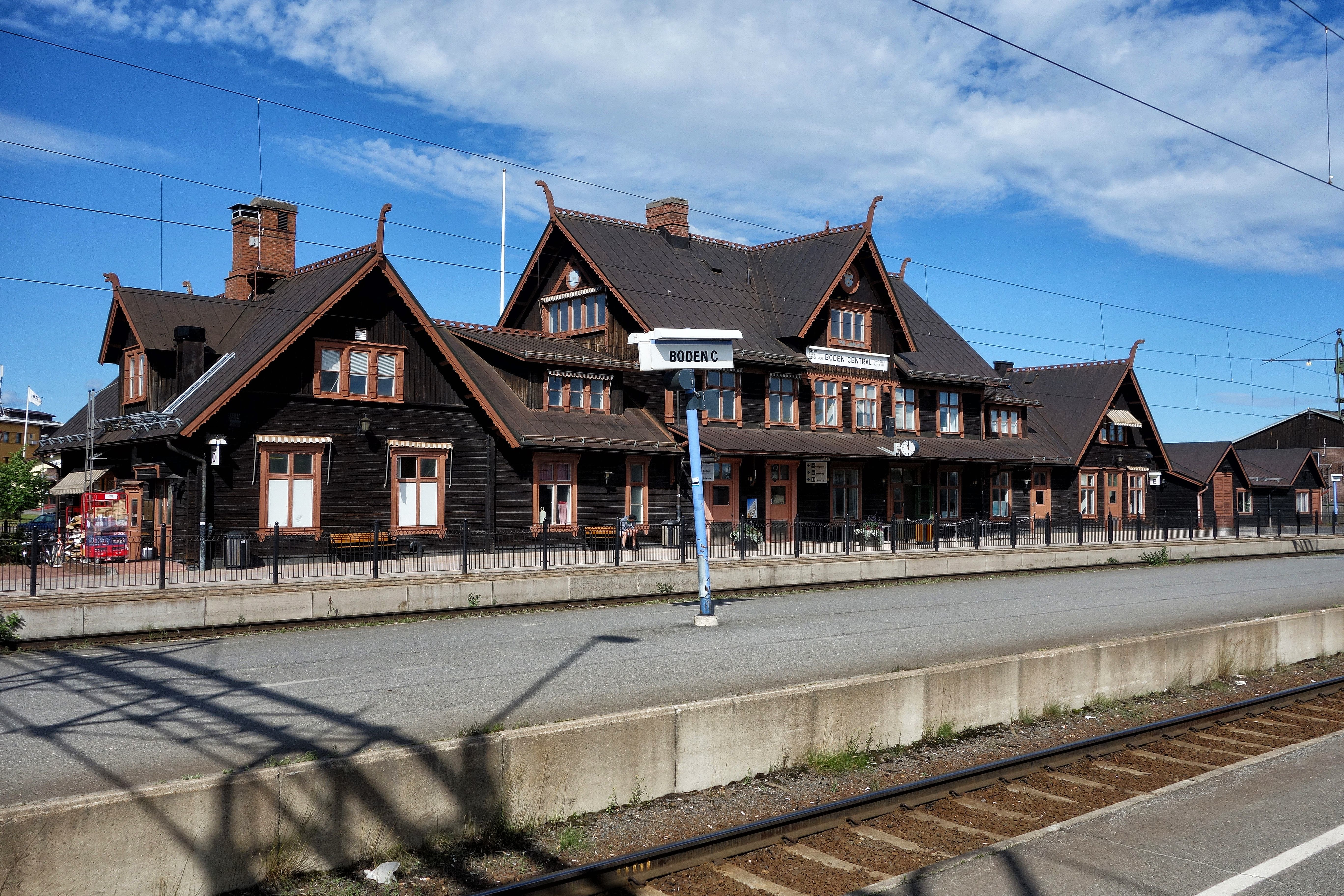 Stationshuset i Boden sett från plattform mellan spår 3 och 4.